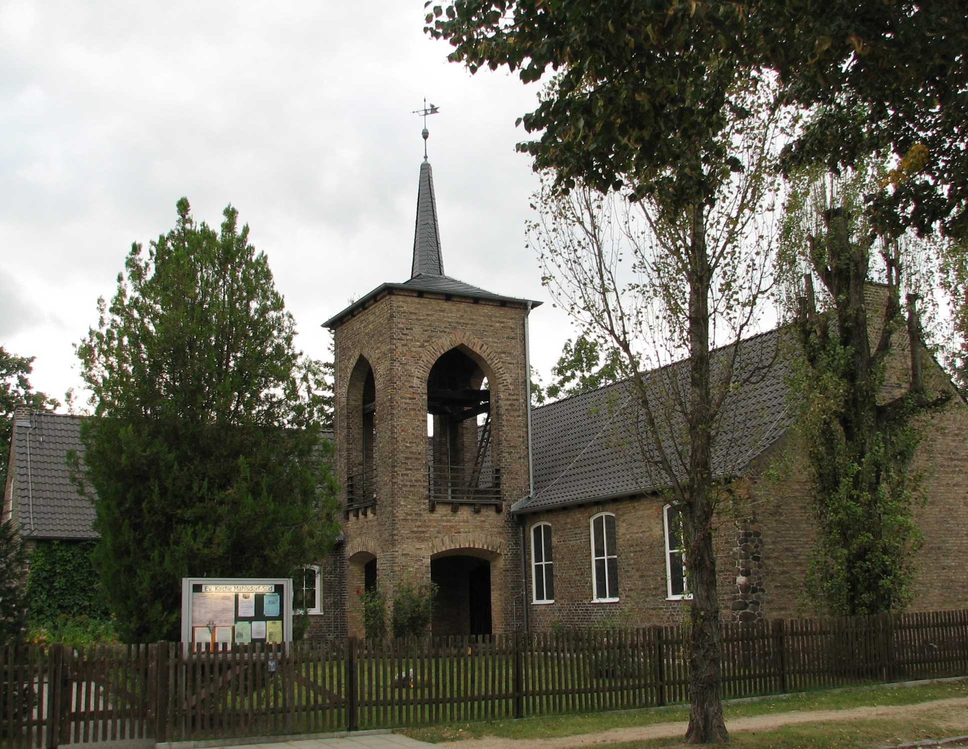 Ansicht des Gemeindeheims Theodor Fliedner